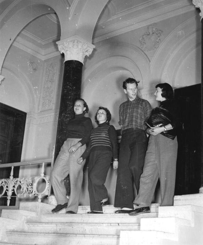 Zentralbild-Klein / 15.11.1954 Staatliches Ensemble der Dorfjugend im Schloss in Neetzow im Kreis Anklam. Neue Studienmöglichkeiten für die Jugend auf dem Lande. (siehe Begleittext) Vier von den neuen Bewohnern des alten Schlosses, die sich im Staatlichen Ensemble der Dorfjugend auf die kulturelle Arbeit vorbereiten: (v.l.n.r.) Eva Soth kommt aus Baumgarten in Mecklenburg von einer Sportschule, Anita Viestenz gehörte zu einer FDGB Volkskunstgruppe in Berlin, Kreis Gadebusch. Günther Jacobs war in Neustrelitz im Haus der Volkskunst tätig, Christa Barchmann ist Abiturientin und kommt aus der Großstadt Dresden. Alle vier gehören zur Tanzgruppe des neugebildeten Staatlichen Ensembles der Dorfjugend.